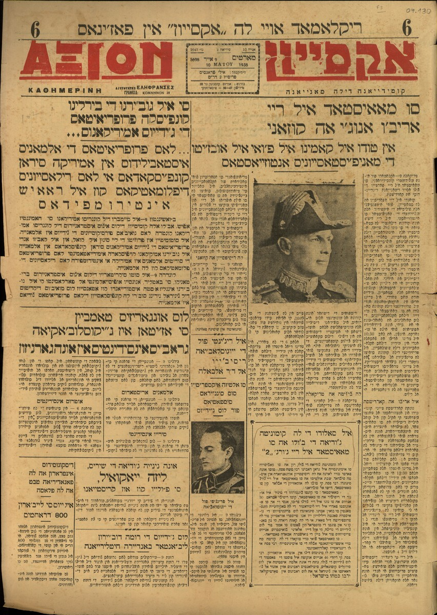 Вестник "Аксион"